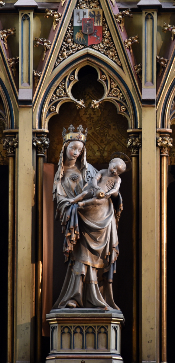 Plzeňská madona - socha na hlavním oltáři katedrály sv. Bartoloměje v Plzni